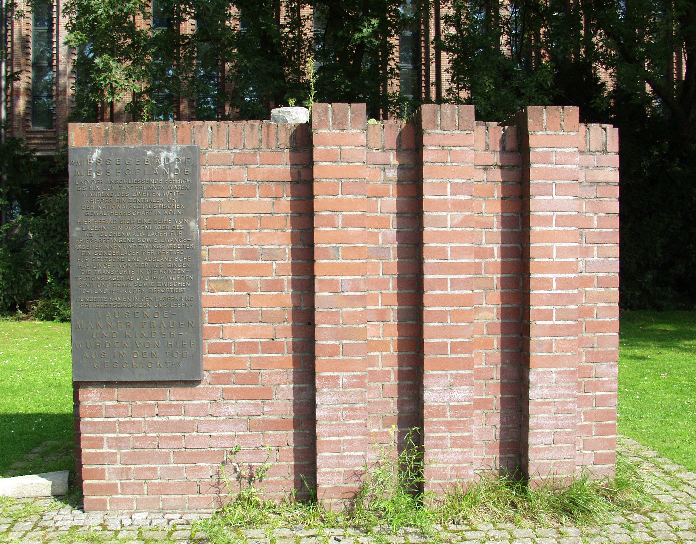 Gedenktafel an der dem Rhein zugewandten Seite der Rheinhallen (ehemalige Messehallen)Text: »Messegebäude, Messegeländeund der anschließende Bereich bis hin zum Tanzbrunnen waren währen des zweiten Weltkrieges ein zentraler Ort der nationalsozialistischen Gewaltherrschaft in Köln. Hier befand sich eine Reihe von Lagern: Ein Außenlager des KZ Buchenwald, Lager für Kriegsgefangene sowie Zwangsarbeiter, ein Sonderlager der Gestapo für deutsche und ausländische Häftlinge. Von hier aus gingen die Transporte in die Konzentrationslager ab und 1940 wurden Sinti und Roma sowie zwischen 1941 und 1944 Juden deportiert. Hunderte kamen in den Lagern und bei Arbeitseinsätzen ums Leben. Tausende Männer, Frauen und Kinder wurden von hier aus in den Tod geschickt.«